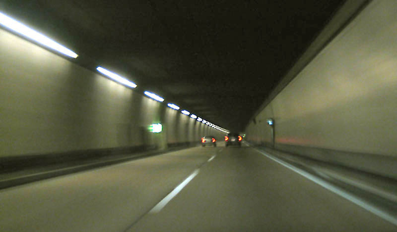 inside Seelisbergtunnel in Central Switzerland; Autobahn A2